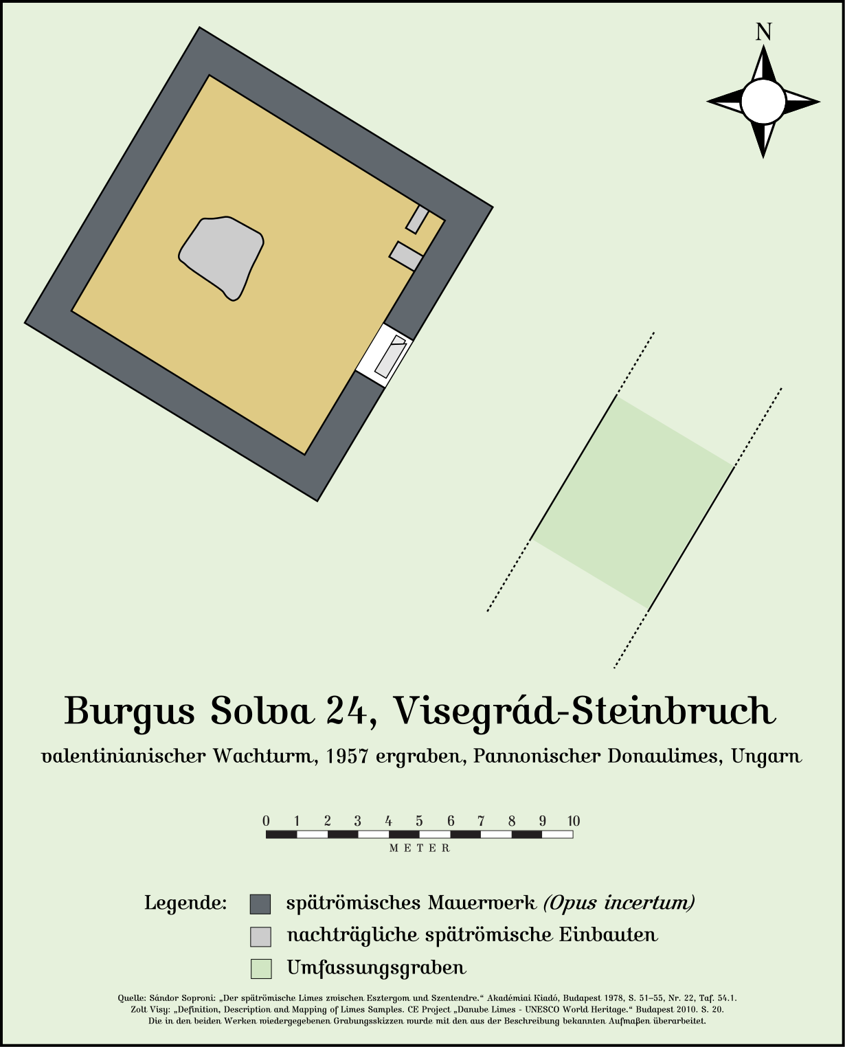 Der valentinianische Burgus Visegrád-Steinbruch (Burgus Solva 24) am nordpannonischen Donauknie in Ungarn. Quellen: Sándor Soproni: „Der spätrömische Limes zwischen Esztergom und Szentendre.“ Akadémiai Kiadó, Budapest 1978, S. 51–55, Nr. 22, Taf. 54.1 sowie: Zolt Visy: „Definition, Description and Mapping of Limes Samples. CE Project „Danube Limes - UNESCO World Heritage.“ Budapest 2010. S. 20. Die in den beiden Werken wiedergegebenen Grabungsskizzen wurde mit den aus der Beschreibung bekannten Aufmaßen überarbeitet.